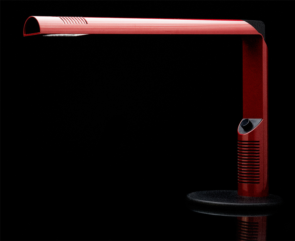 Luci Abele Desk Lamp